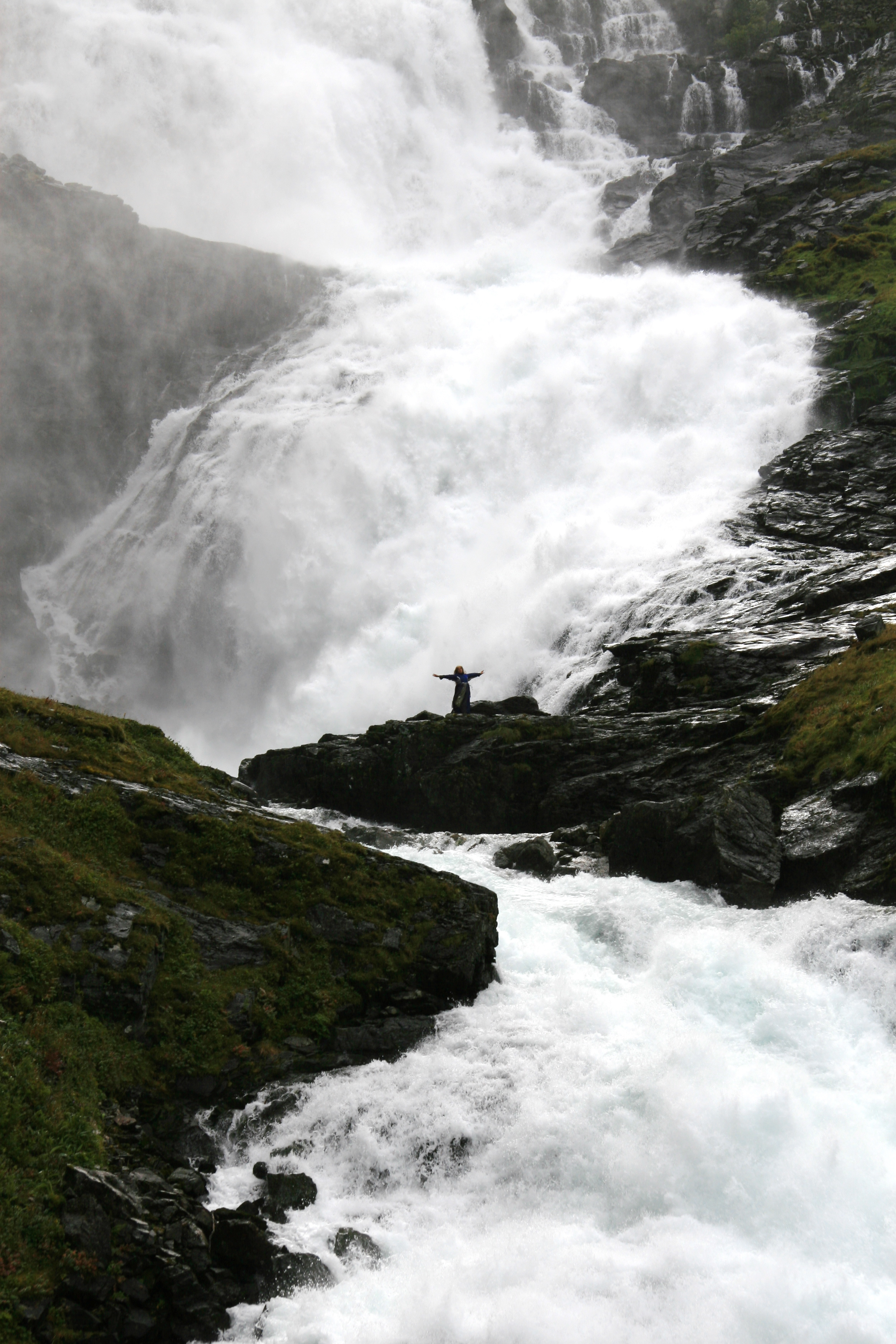 Kjosfossen med huldreshow